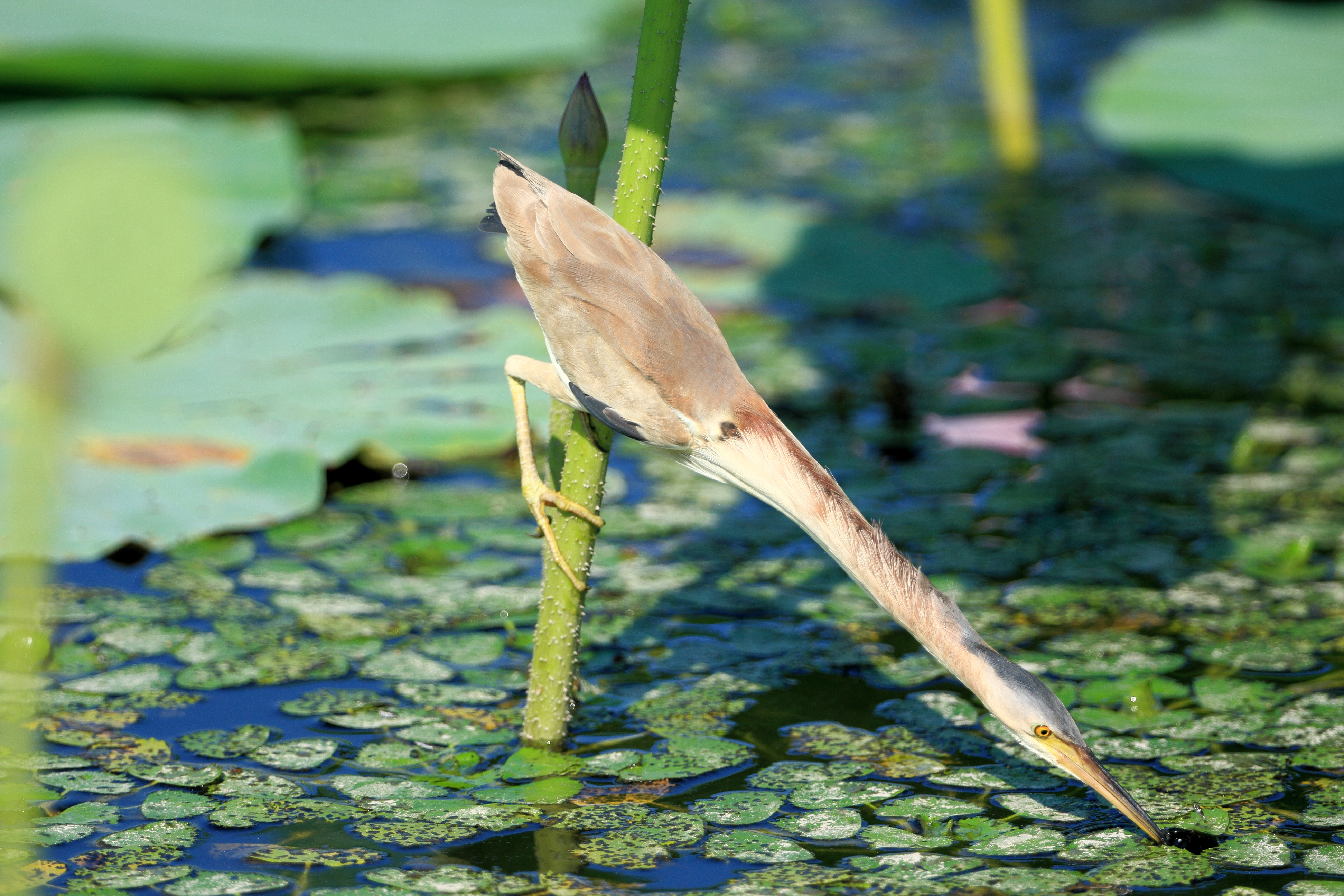 新潟県阿賀野市 瓢湖で撮影されたヨシゴイ。 水中の魚を補食するために頸部を伸ばしている。